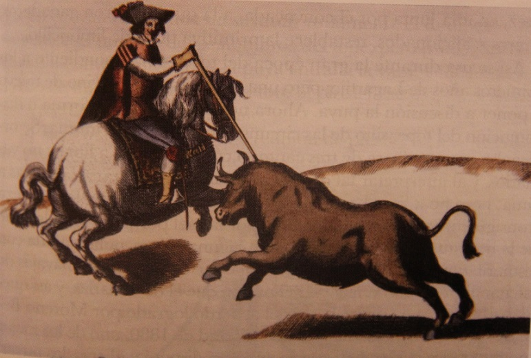 Ilustración «Clavando el rejón» perteneciente al libro de Luis de Tapia y Salcedo Exercicios de la gineta